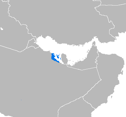 Árabe bajreiní